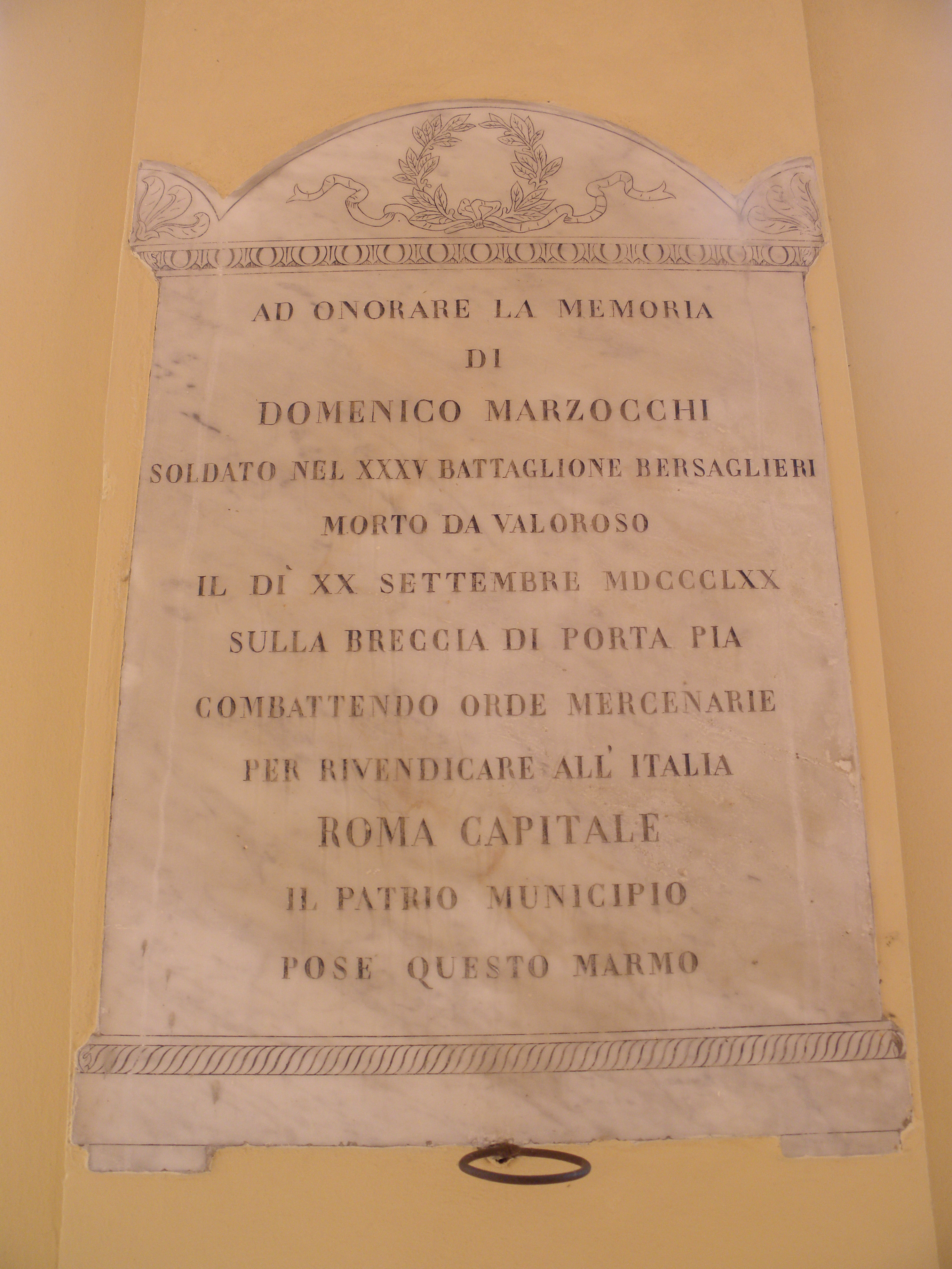 San Giorgio di Piano, il Palazzo Comunale, sede municipale. Una delle lapidi murate sul porticato.